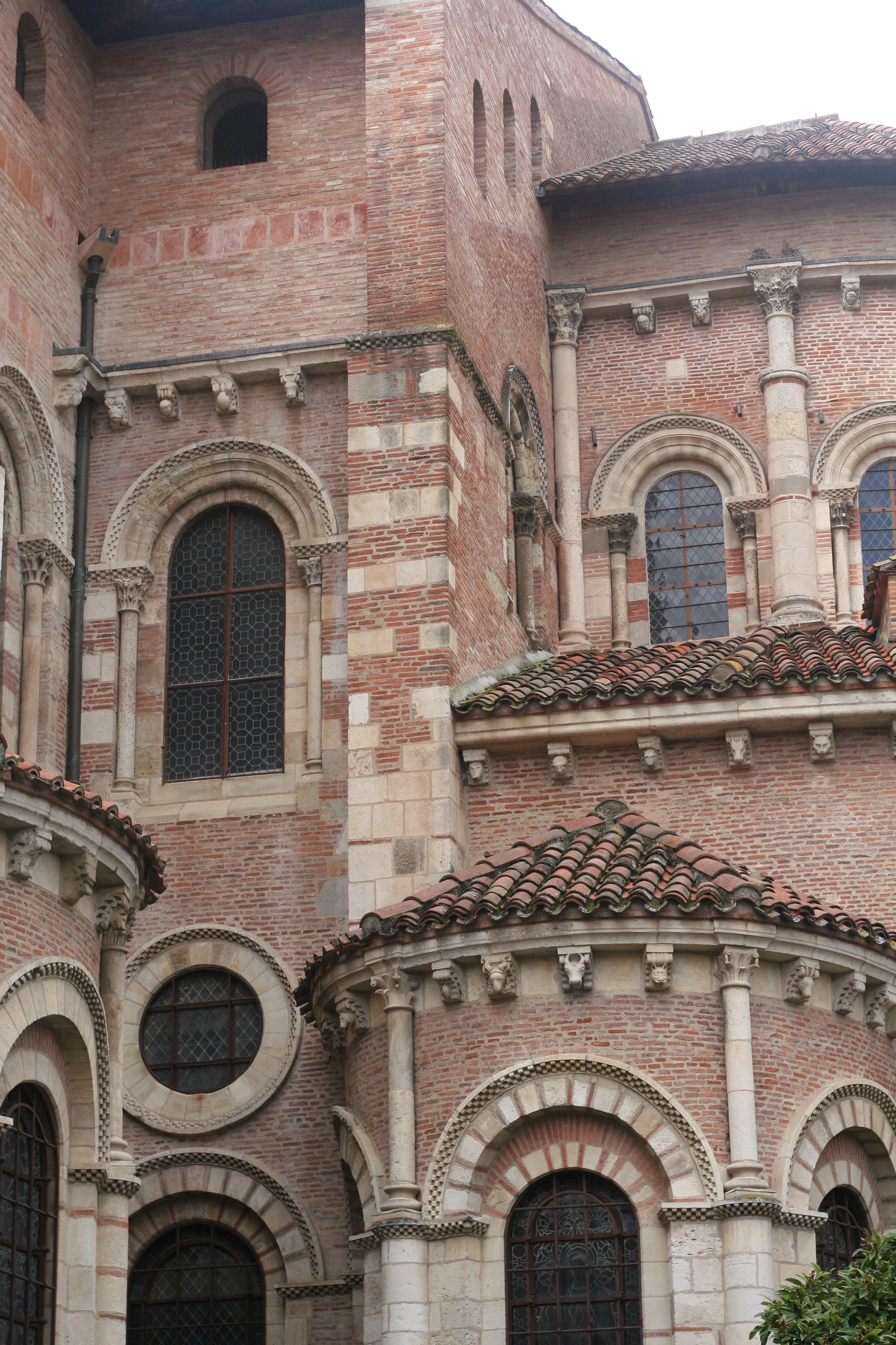 St Sernin